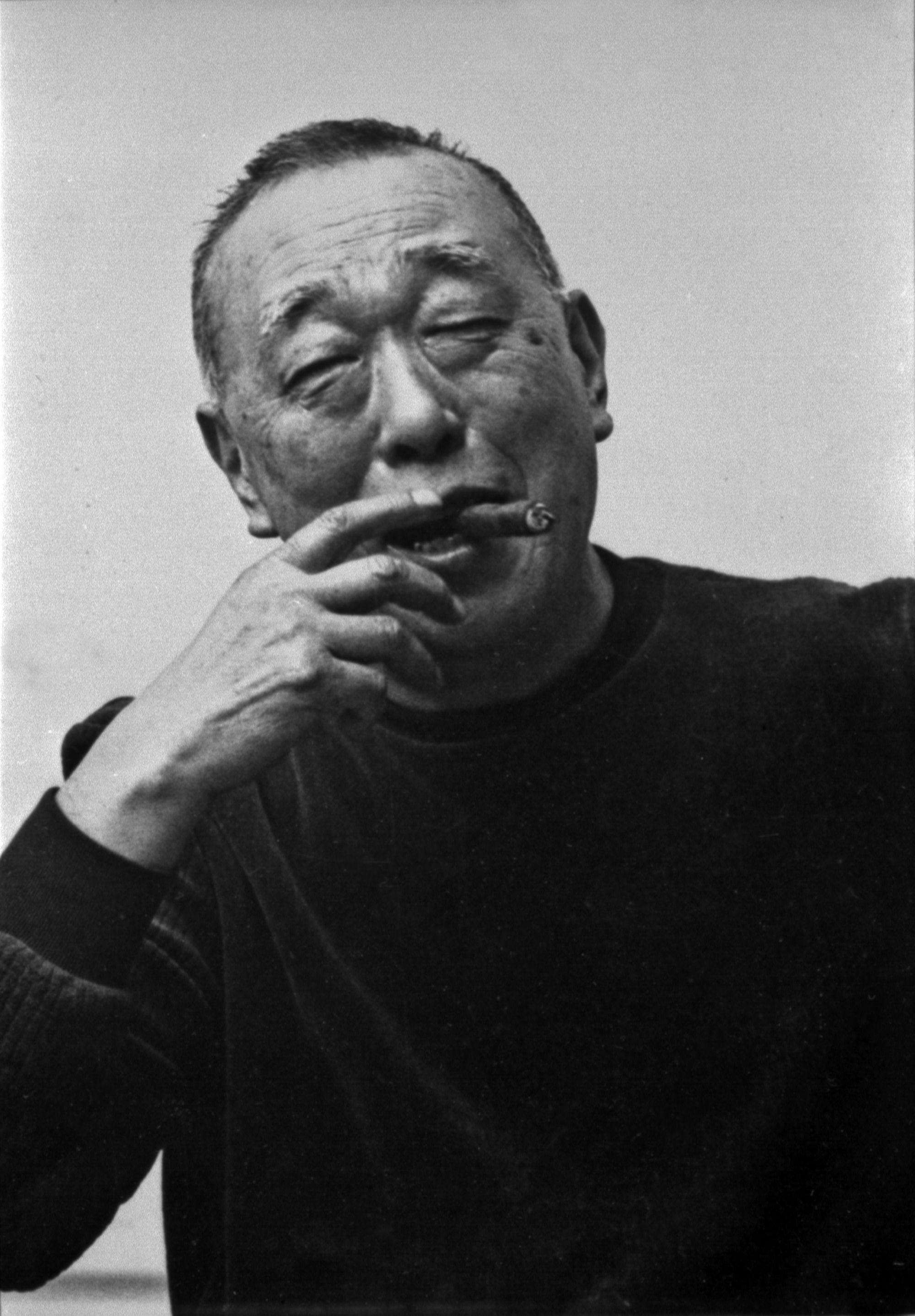 Portrait d'Itsuo Tsuda